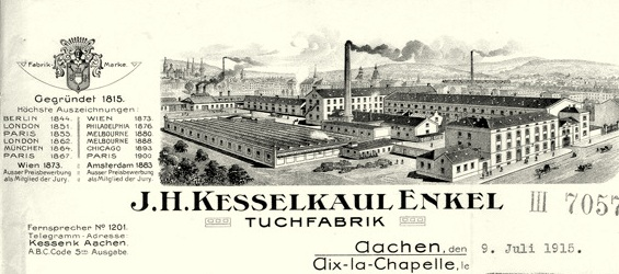 Briefkopf mit der Ansicht auf die Tuchfabrik Kesselkaul in der Krakaustraße in Aachen sowie die Auszeichnungen auf internationalen Ausstellungen